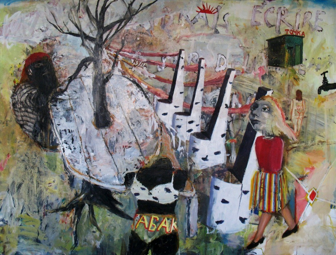 Художник Игорь Тишин. "Пик-ник", 150x200